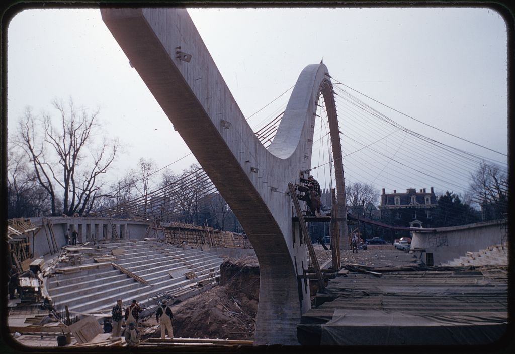 Yale University, David S. Ingalls Hockey Rink, New Haven, Connecticut, 1956-59. Construction detail Note: No known restrictions on publication. Balthazar Korab Archive (Library of Congress).